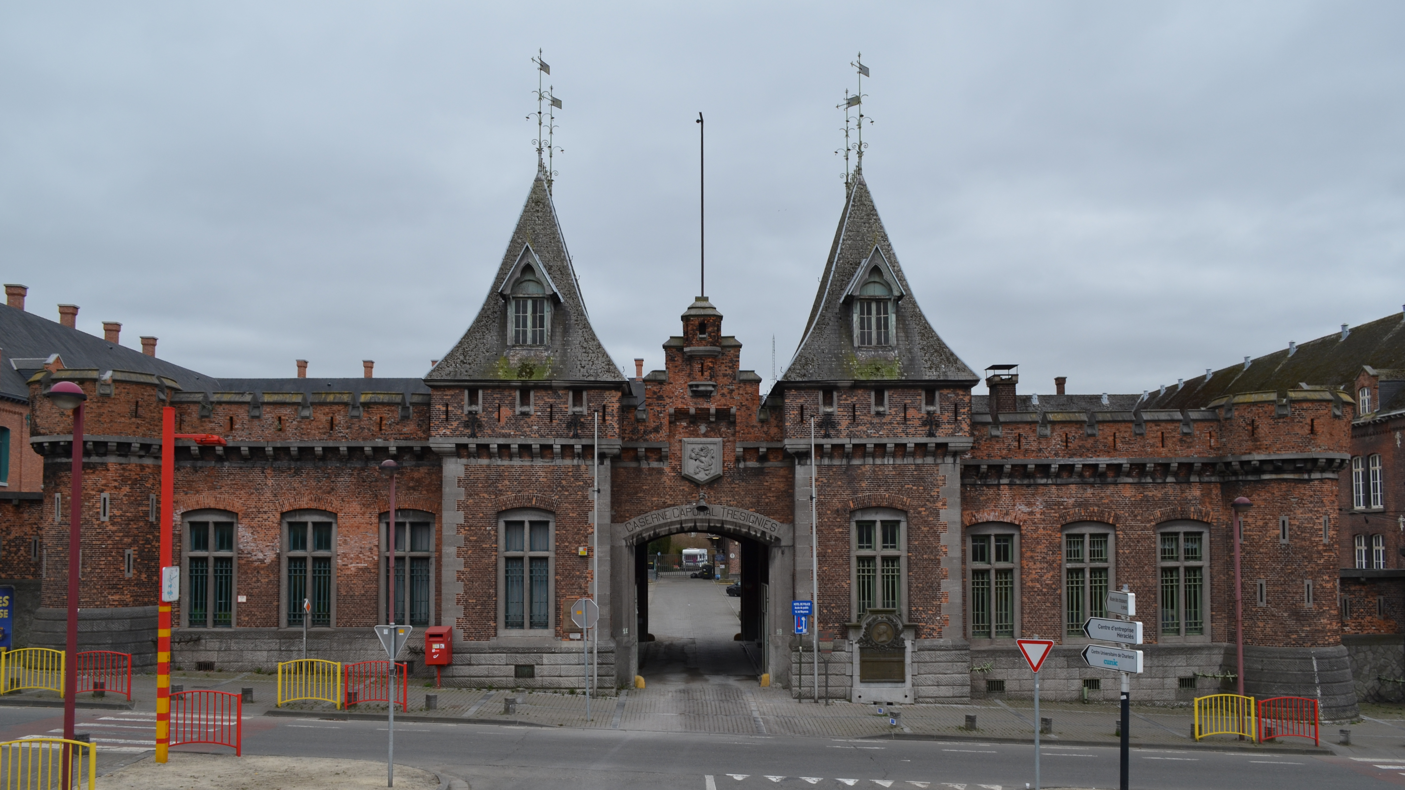 Charleroi (Belgique, avenue Général Michel : Caserne Caporal Trésignies